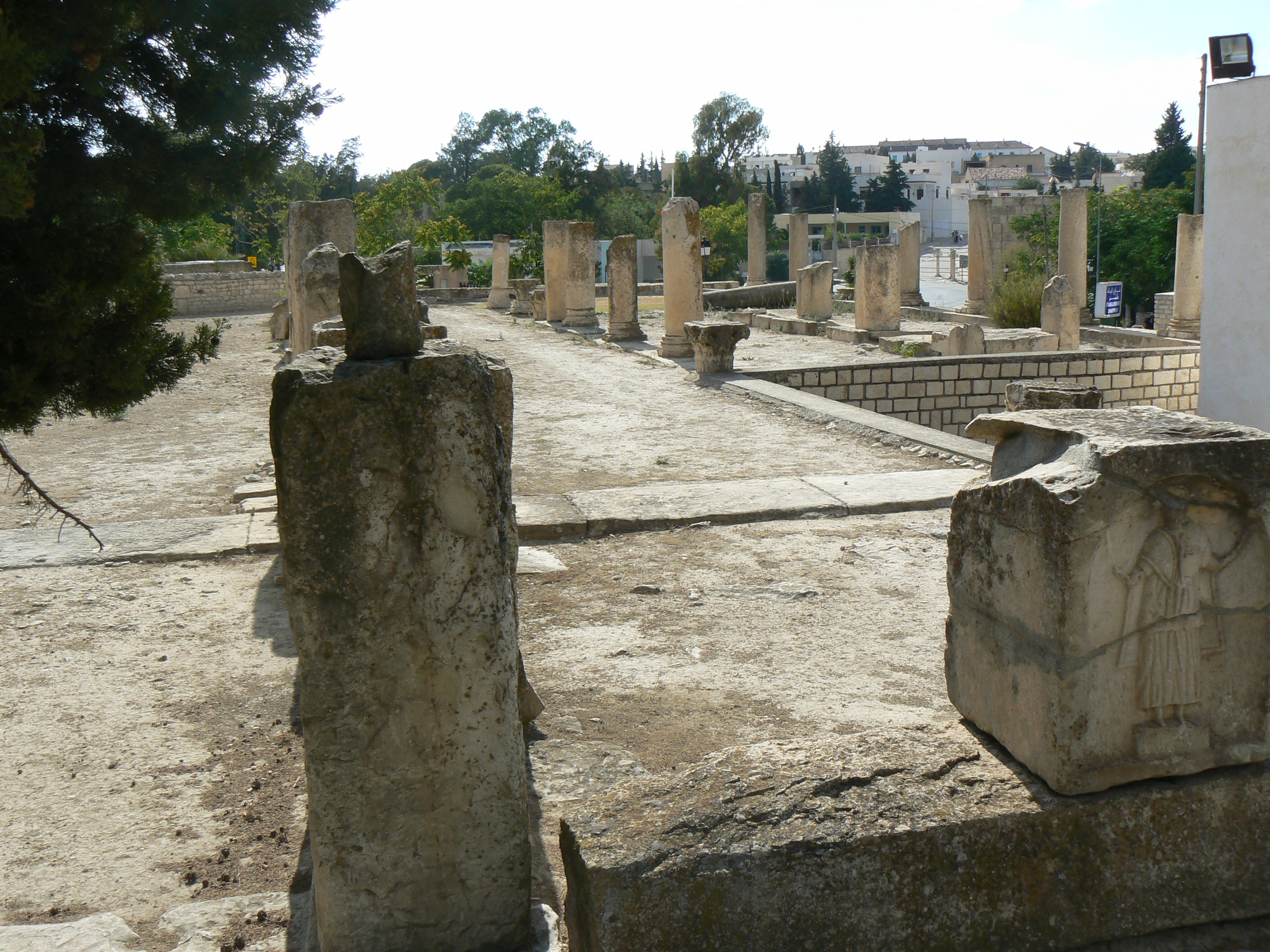 Ruines de la basilique derrière le musée de Makthar